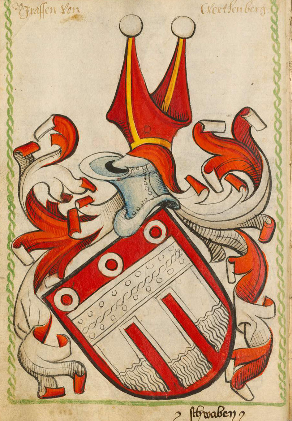 Scheibler'sches Wappenbuch , älterer Teil Schwaben Werdenberg-Sargans